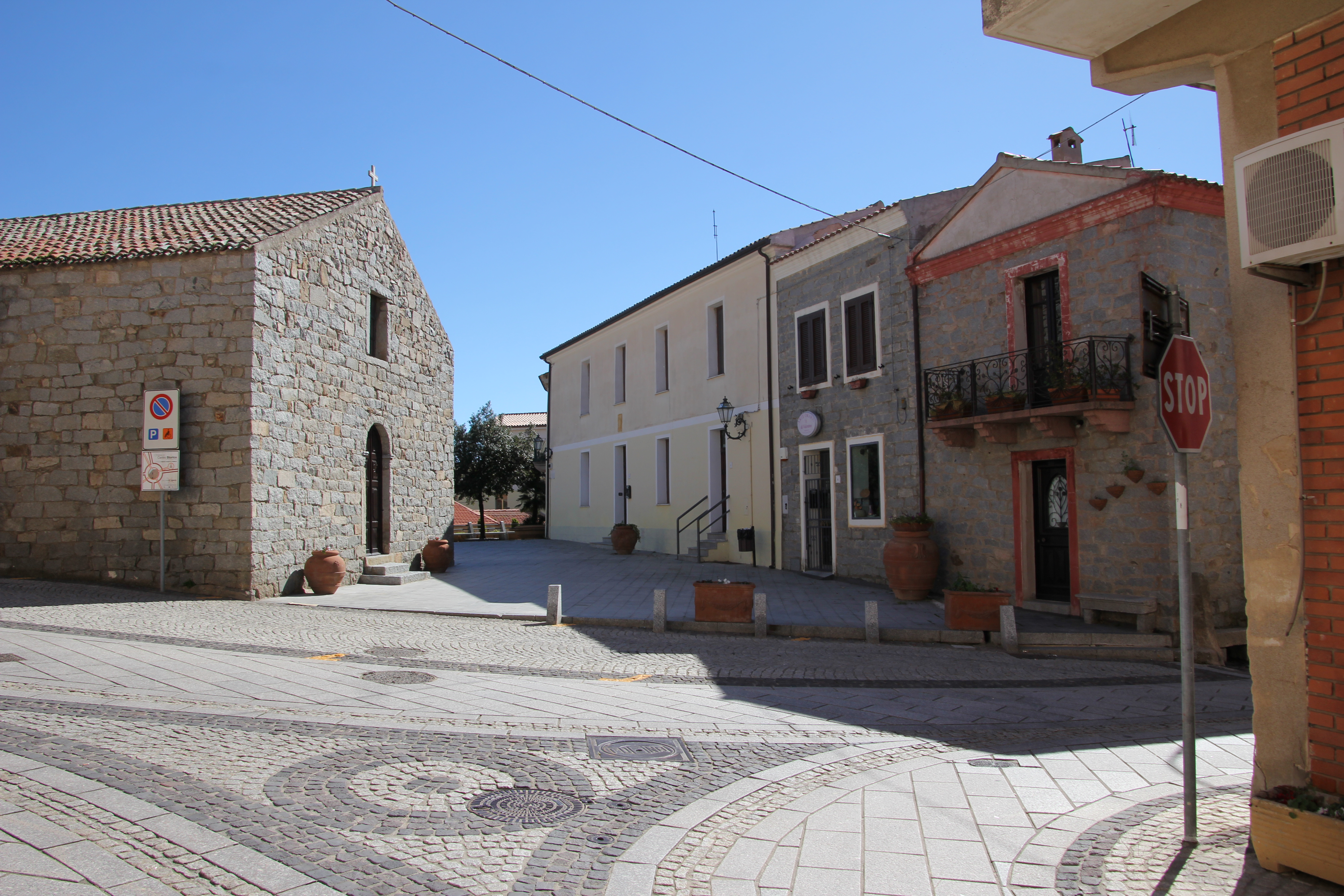 Trinità d'Agultu